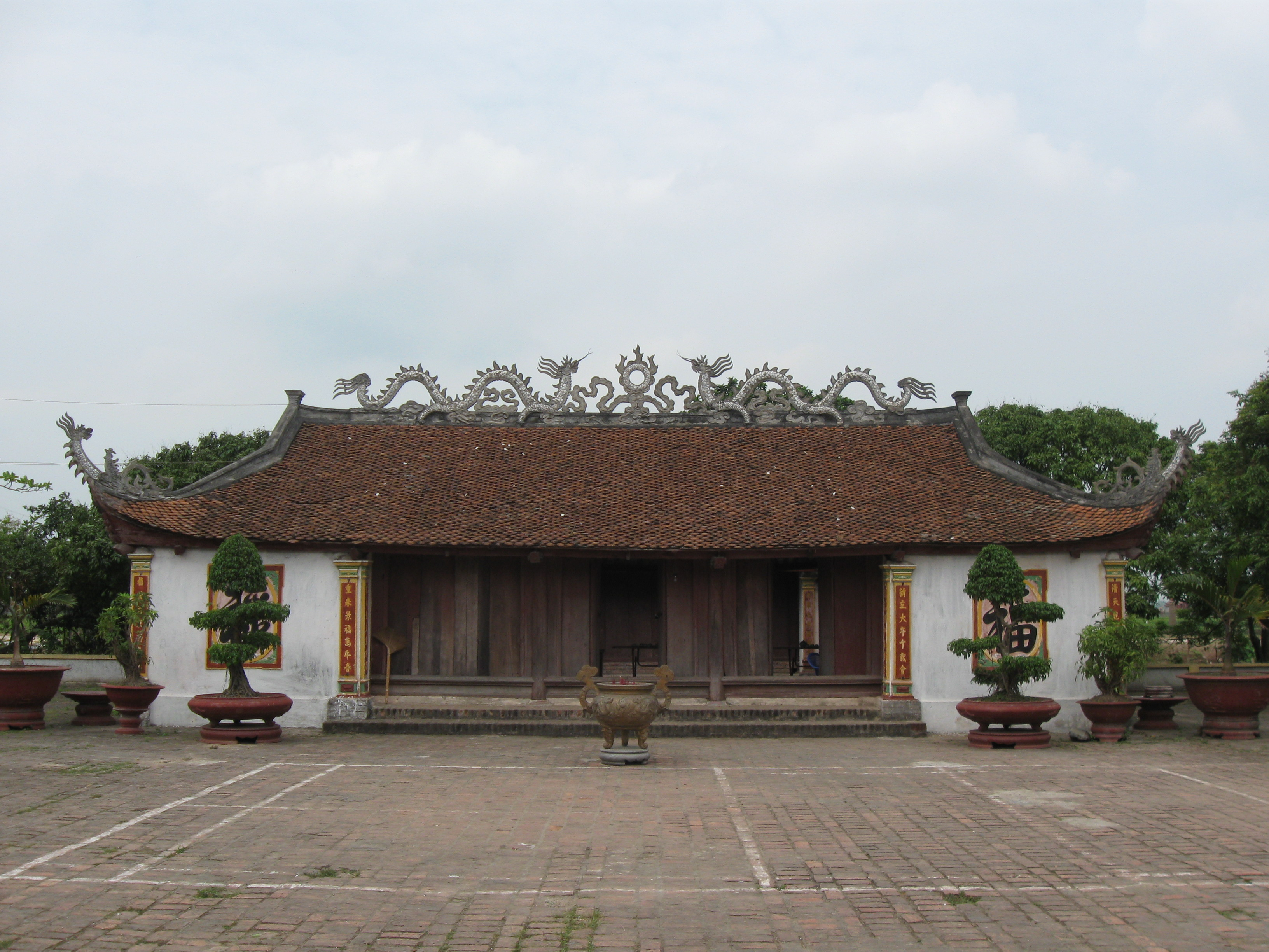 Hình tự chụp bởi Bigland